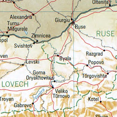 Bjala - Lage der Stadt in Bulgarien